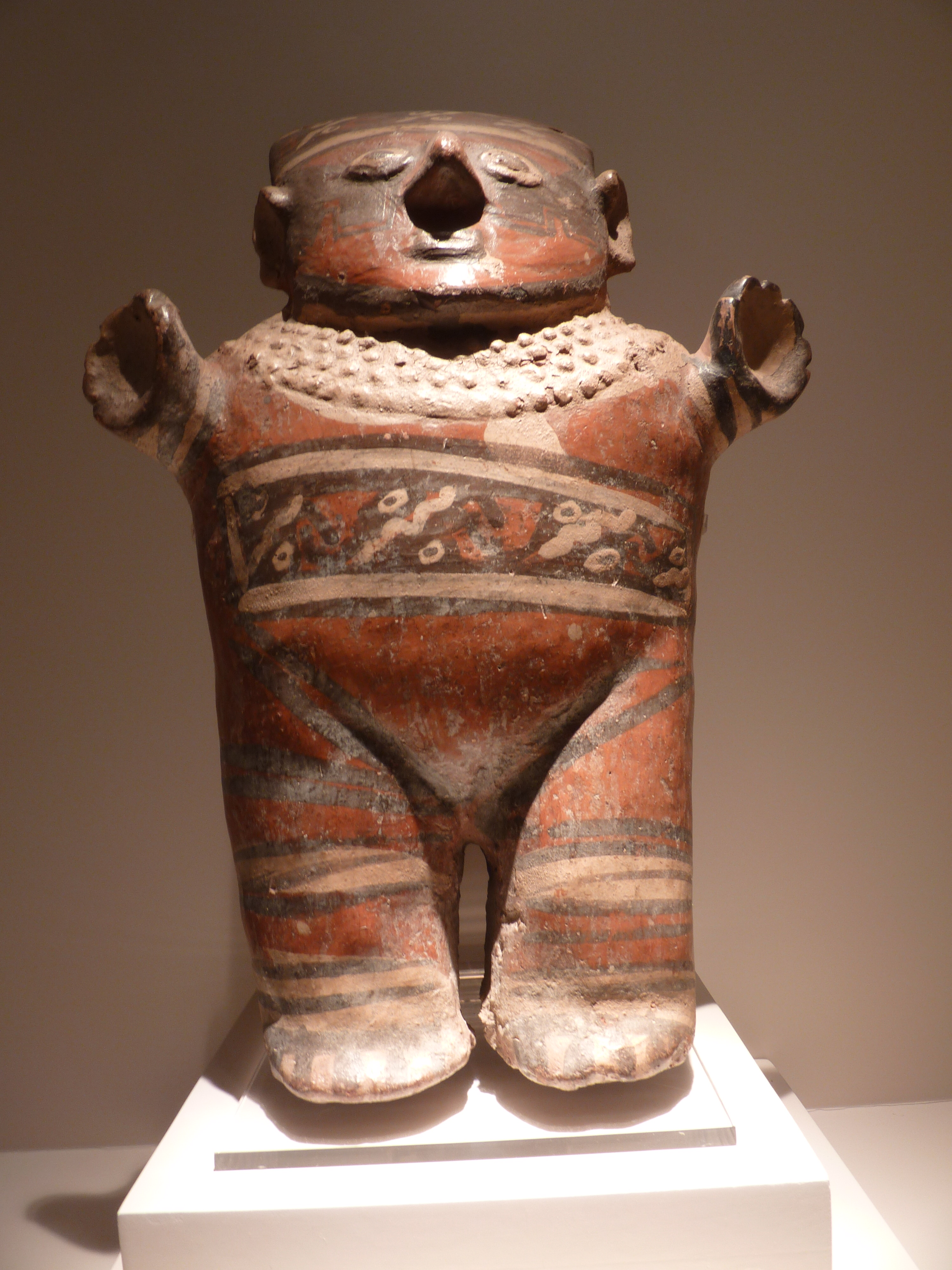 Museo de Arte Precolombino, Cusco